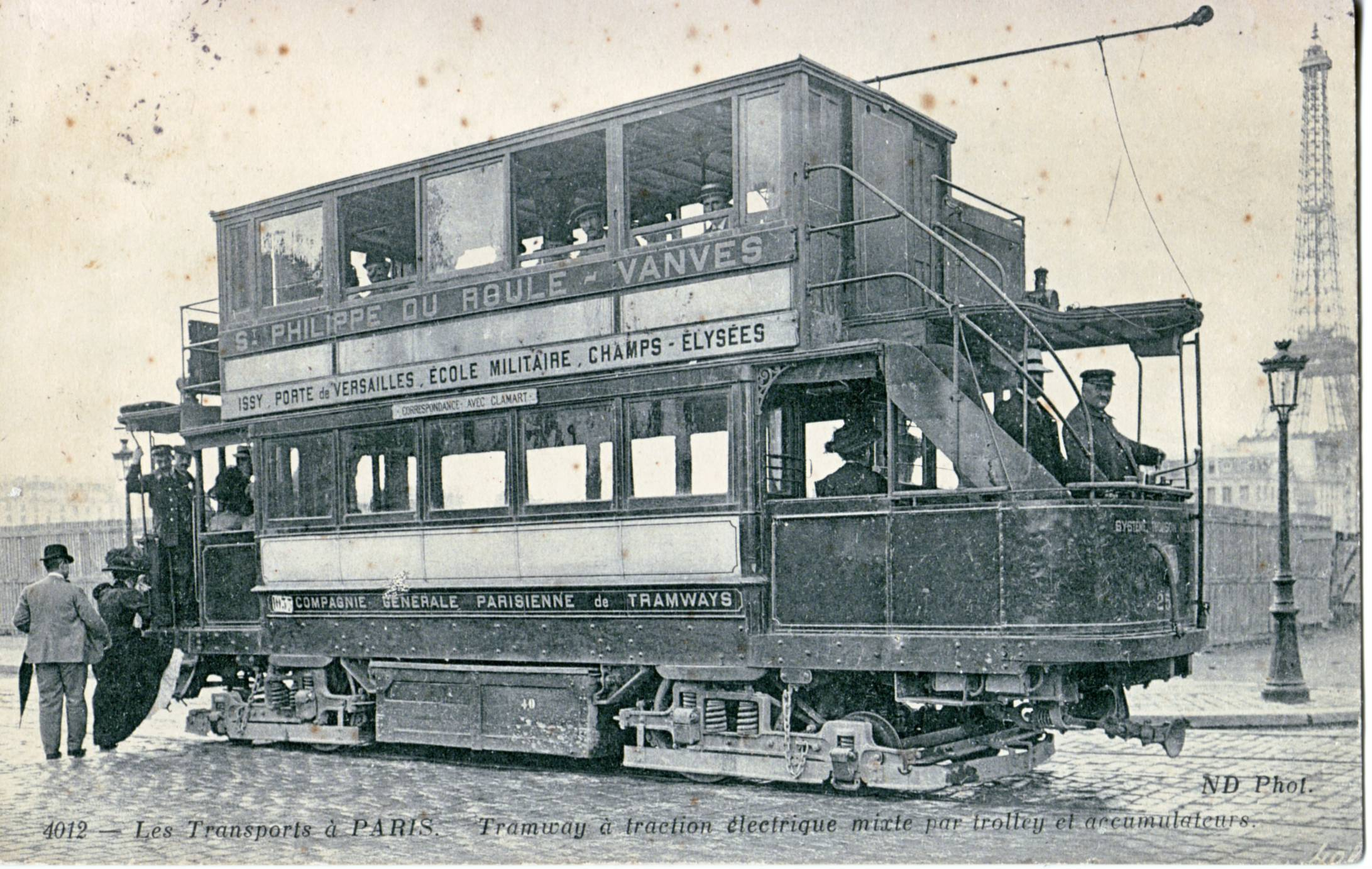 Carte postale ancienne des éditions ND (N°4012) : Tramway électrique de la CGPT à alimentation mixte, par batteries et par trolley captant la ligne aérienne.